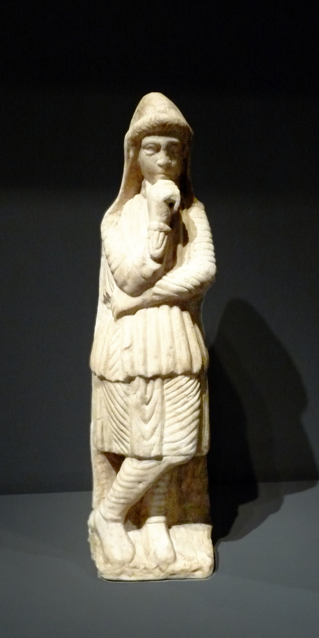 Atis hallado en Villa Fortunatus, Fraga, Huesca. Réplica del original en marmol de Luni (Carrara) que se encuentra en el Museo de Huesca. S. IV d.C.